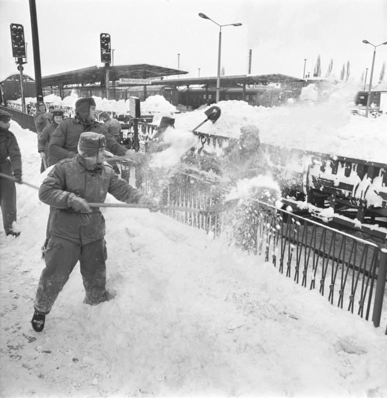 Neubrandenburg, Soldaten beim Schneeräumen ADN-ZB/Bartocha/2.1.1979 /Neubrandenburg: Schneeräumung auf Gleisanlagen Tausende Helfer der Bevölkerung und der Nationalen Volksarmee unterstützen am 2.1.1979 die Eisenbahner auf dem Bahnhof der Stadt, um die Gleise von den Schneemassen freizuschaufeln. Unser Foto zeigt Soldaten der Einheit Burr.